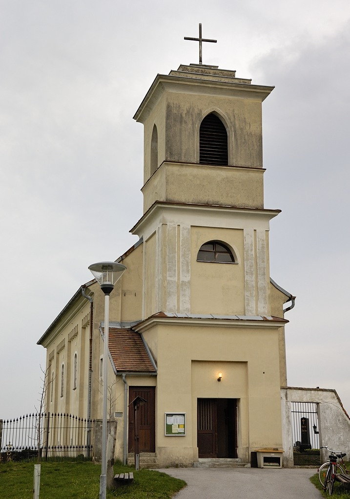 Kath. Filialkirche hl. Ulrich